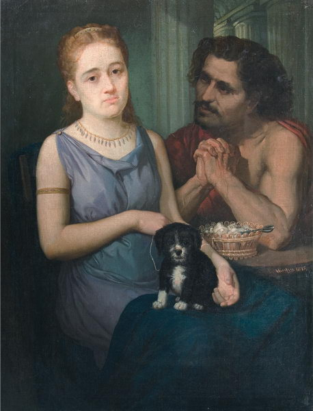 Sava Henţia - Autoportret cu logodnica, ulei pe pânză, Muzeul Naţional de Artă al României, Bucureşti